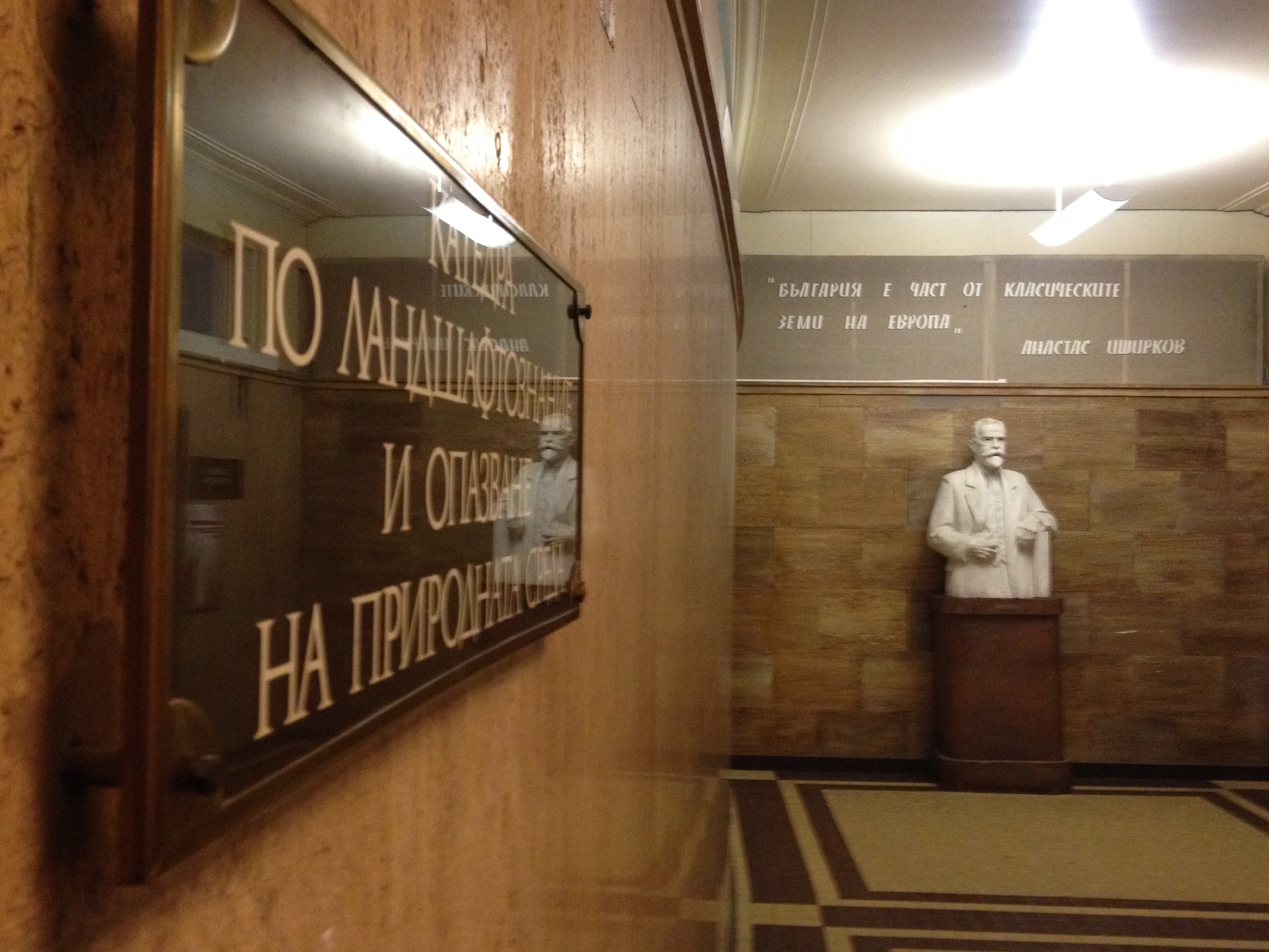 Катедра ЛОПС в ГГФ на СУ